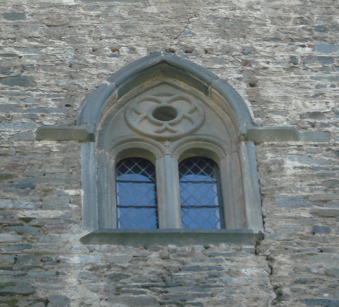 Una delle finestre del castello di Verres